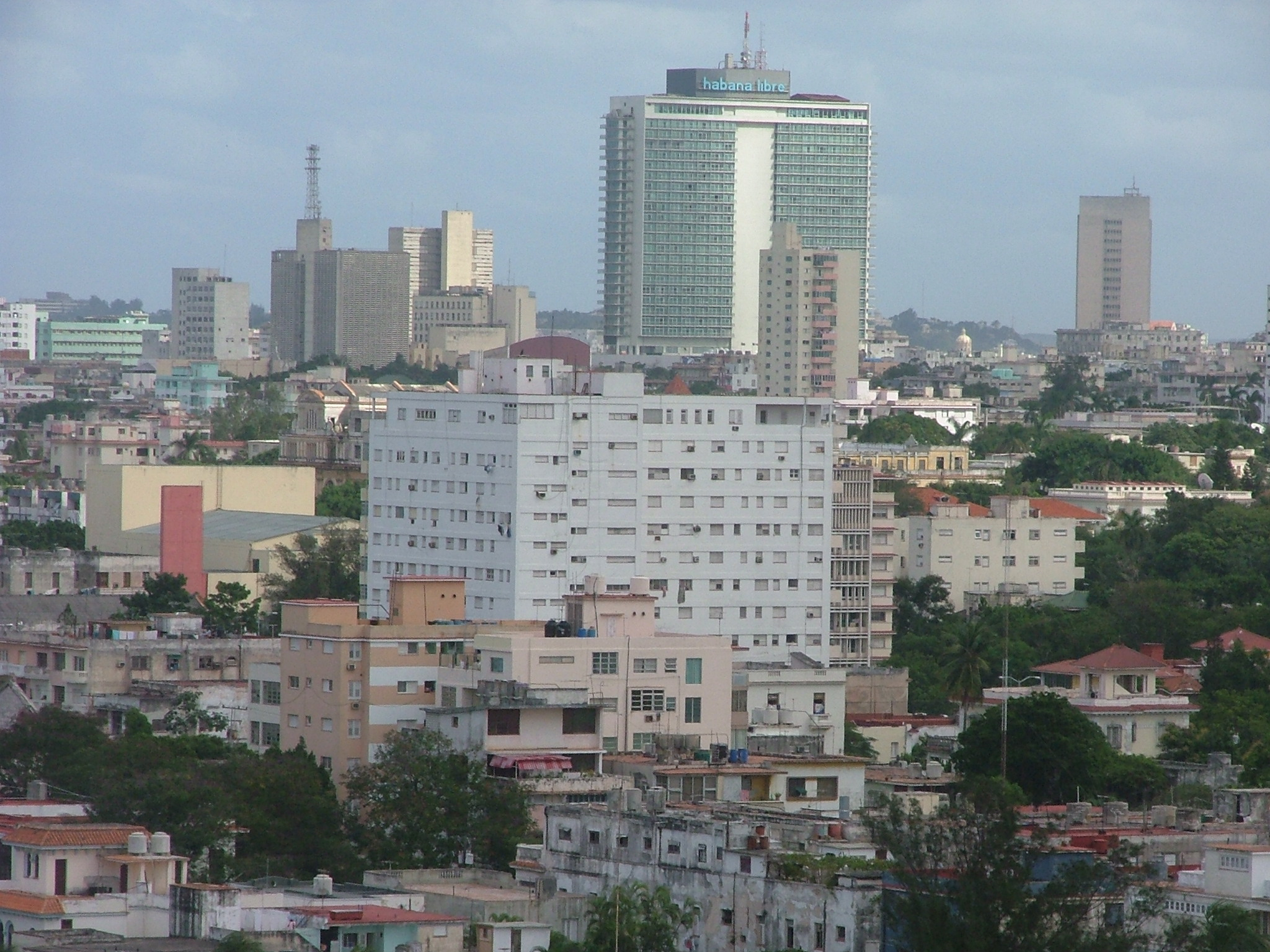 Barriada del Vedado